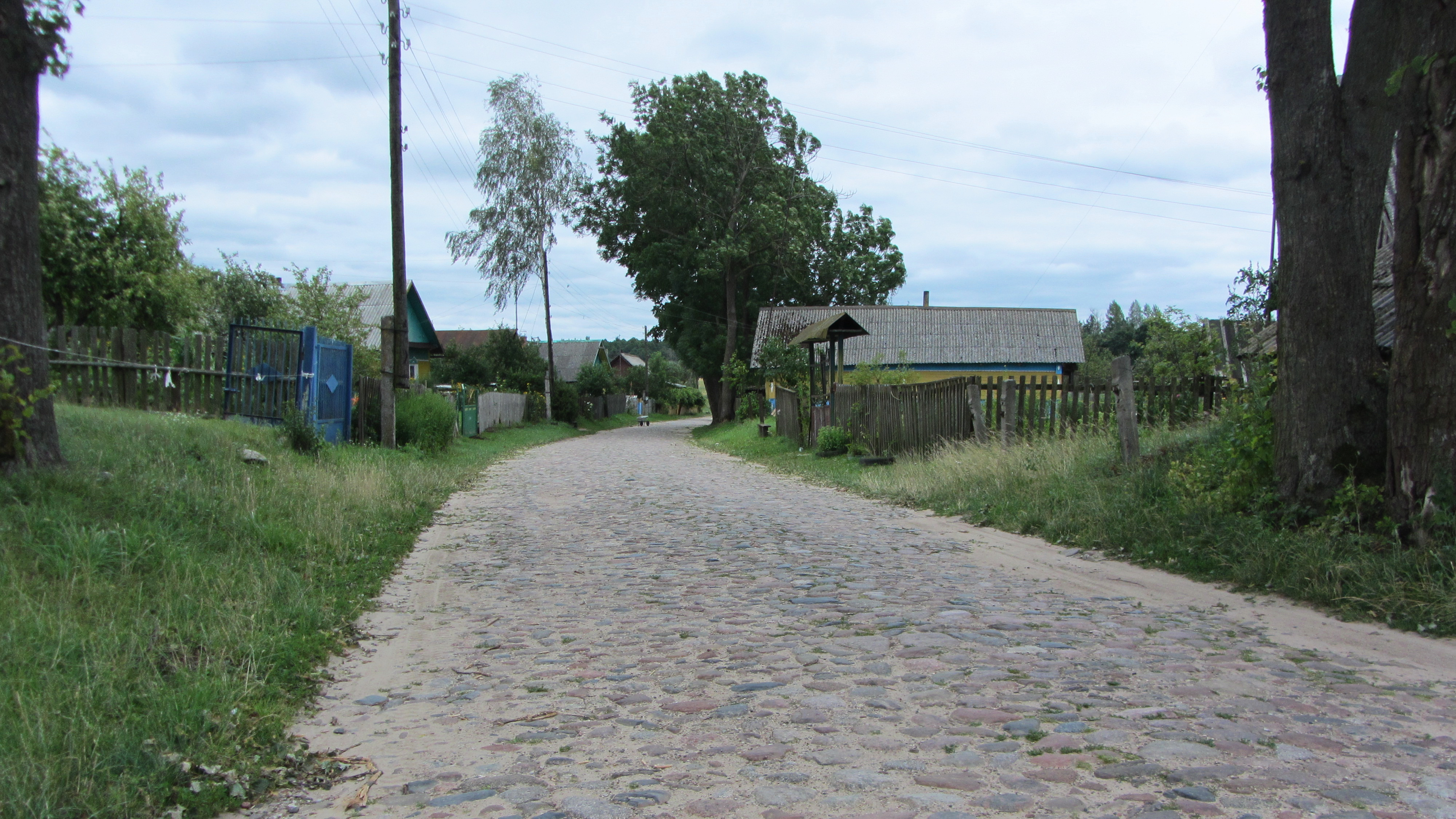 Вёска Церабель, Пухавіцкі раён.